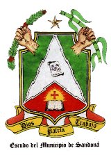 Escudo del municipio de Sandoná(Nariño).